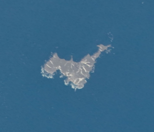 Остров Анучина. Снимок с МКС. Фрагмент